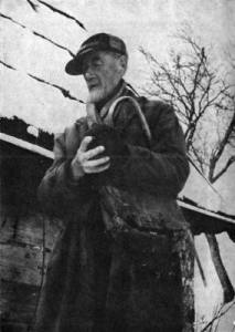 Lazar Dljaca vers la fin de sa vie